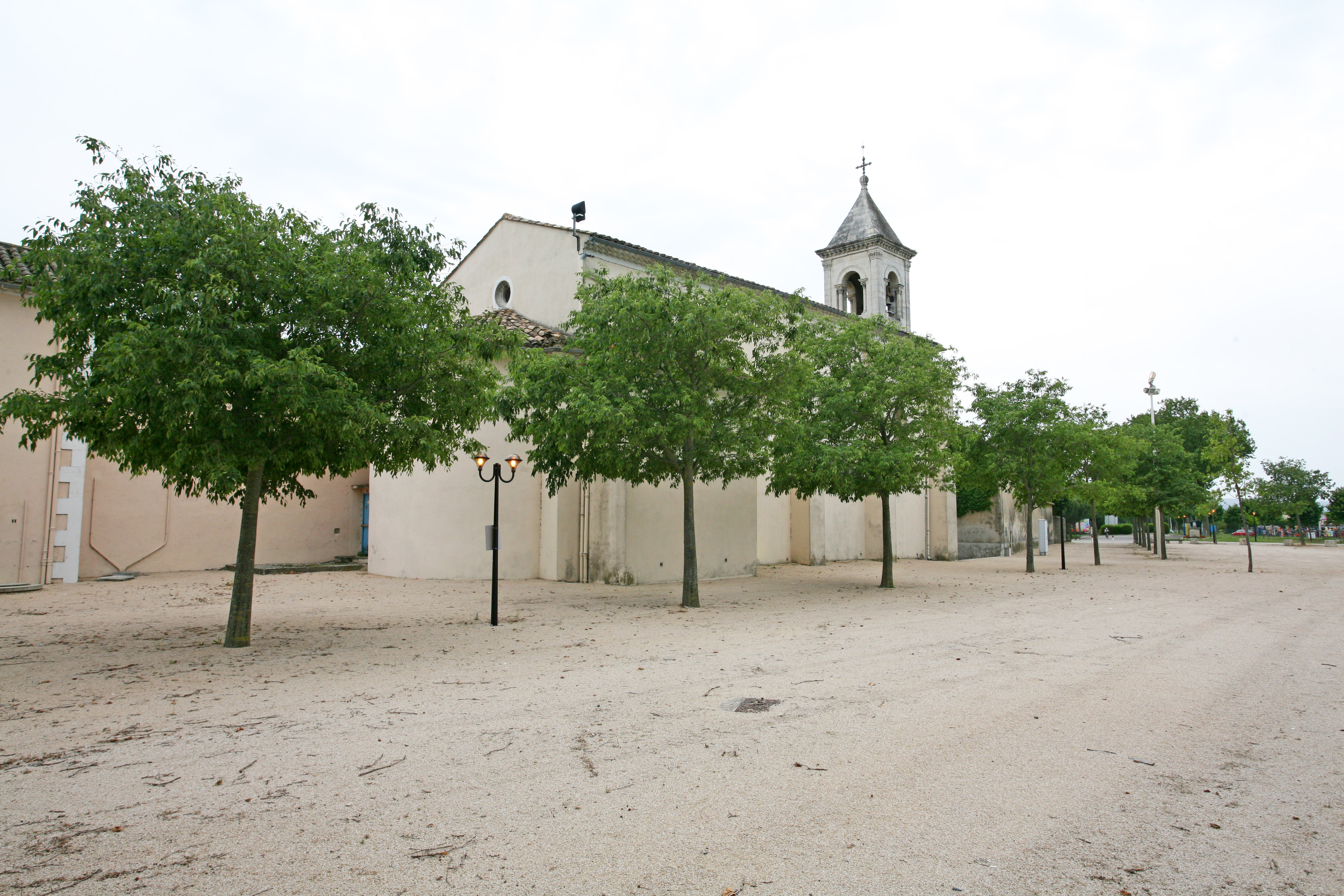 L'église de Lamotte-du-Rhône (commune de Vaucluse)